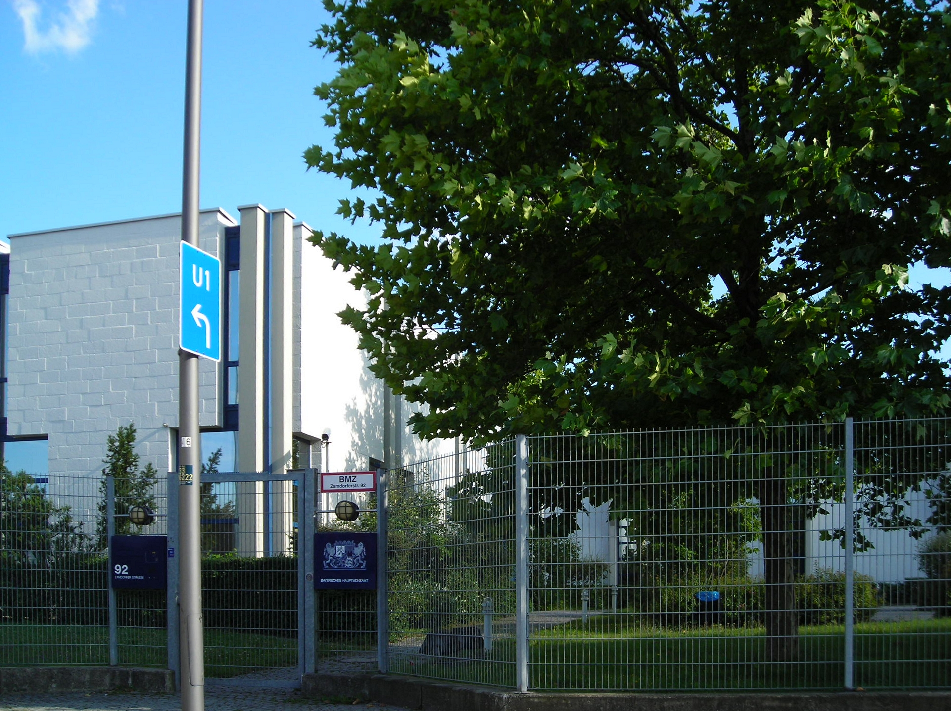 Haupteingang zum Bayerischen Hauptmünzamt, München-Denning, Germany